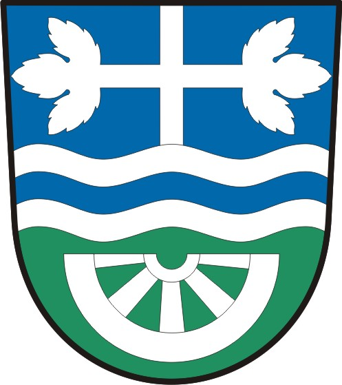 Všestudy